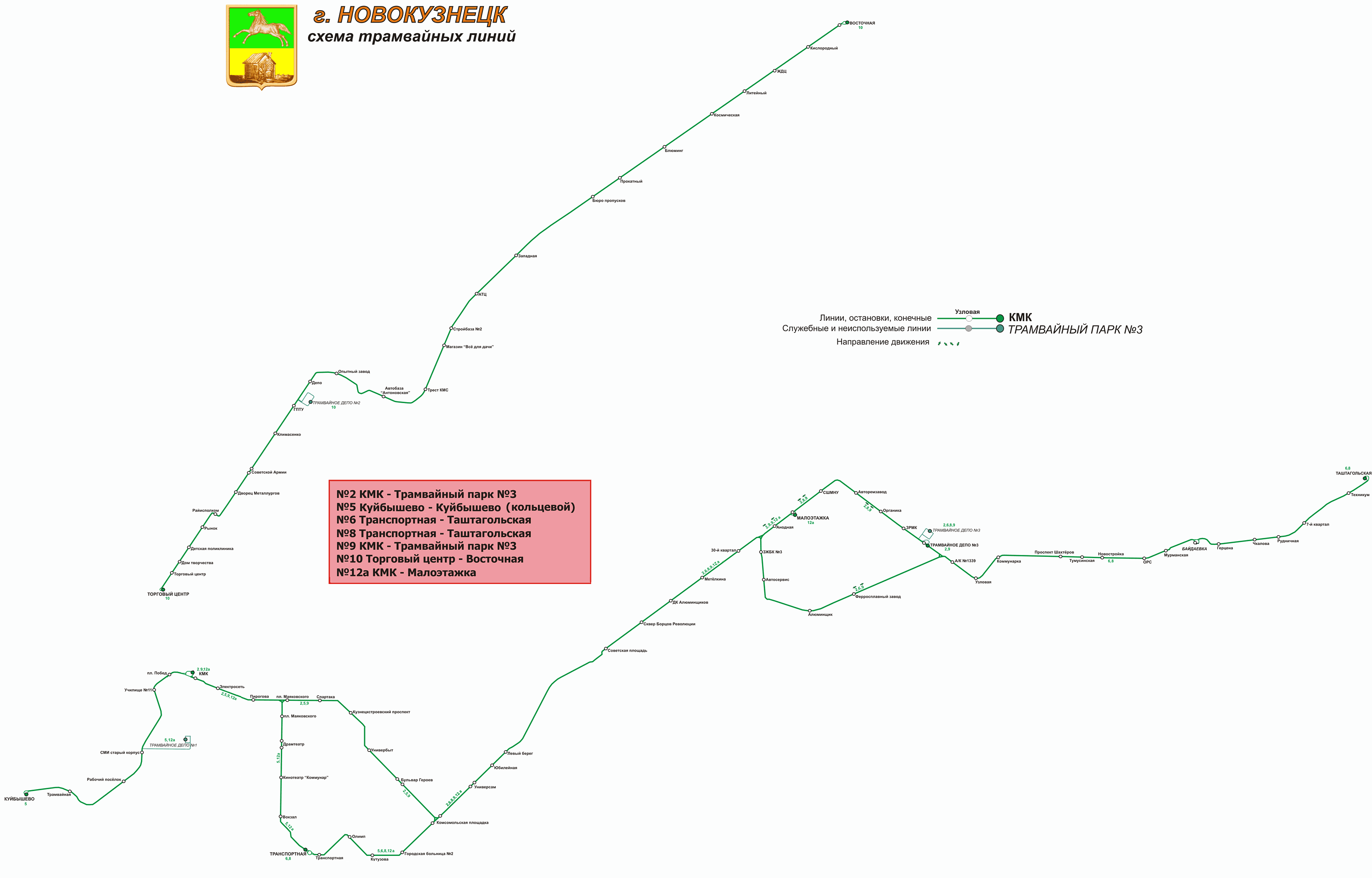 схема маршрутов